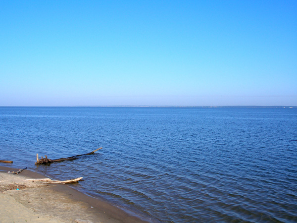 Обское море, вид с Бердского мыса